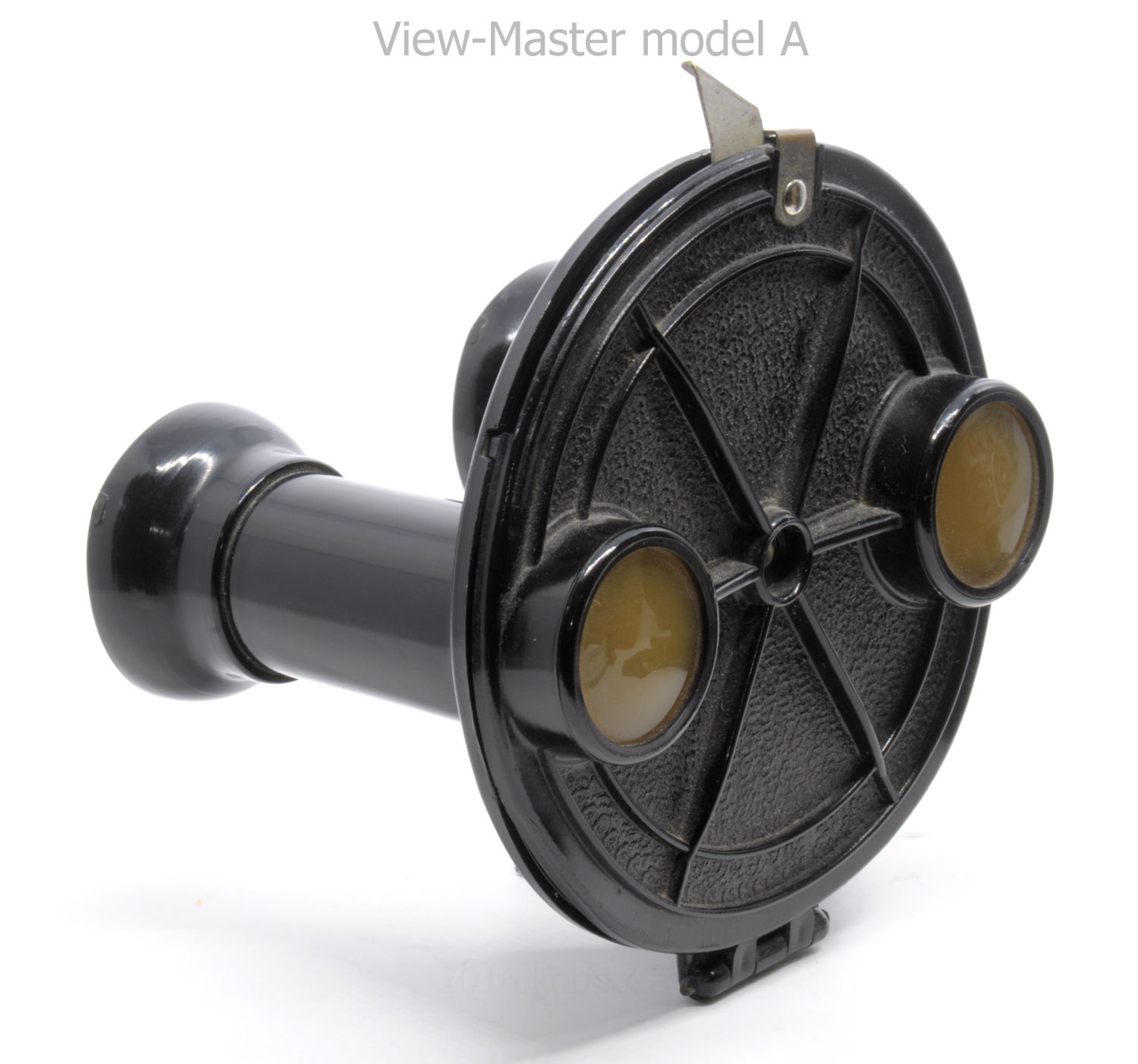 วิว-มาสเตอร์ โมเดล เอ (A) สีดำ วัสดุ โกดัก เทไนต์